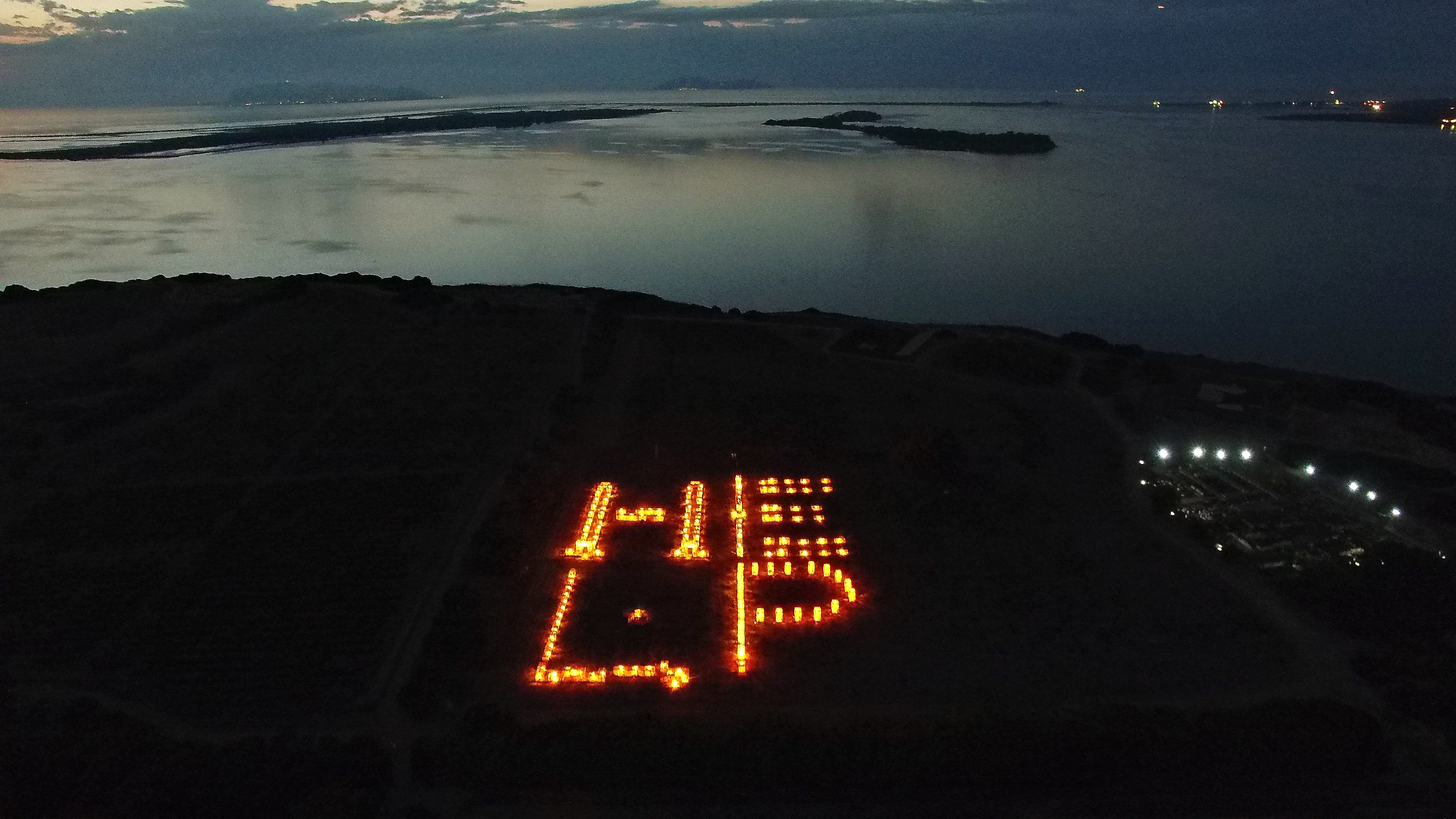 Fotografia dall'alto dell'opera intitolata "HELP" di Maria Cristina Finucci a Mozia nel 2016.